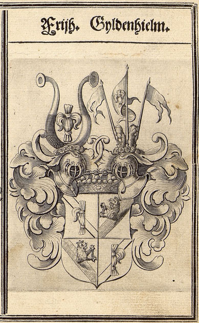 Friherrliga ätten Gyllenhjelm